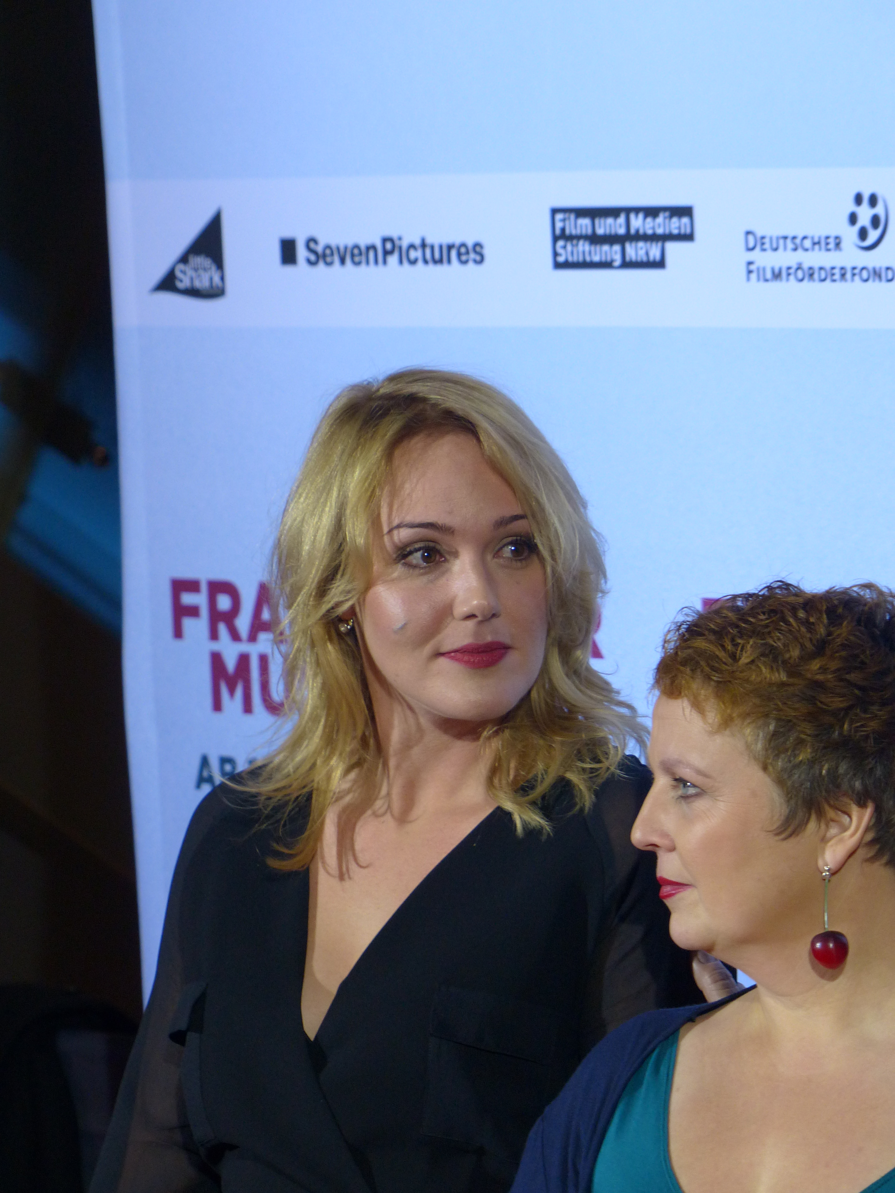 Alwara Höfels bei der Kinopremiere von "Frau Müller muss weg", Januar 2015, Cinedom Köln